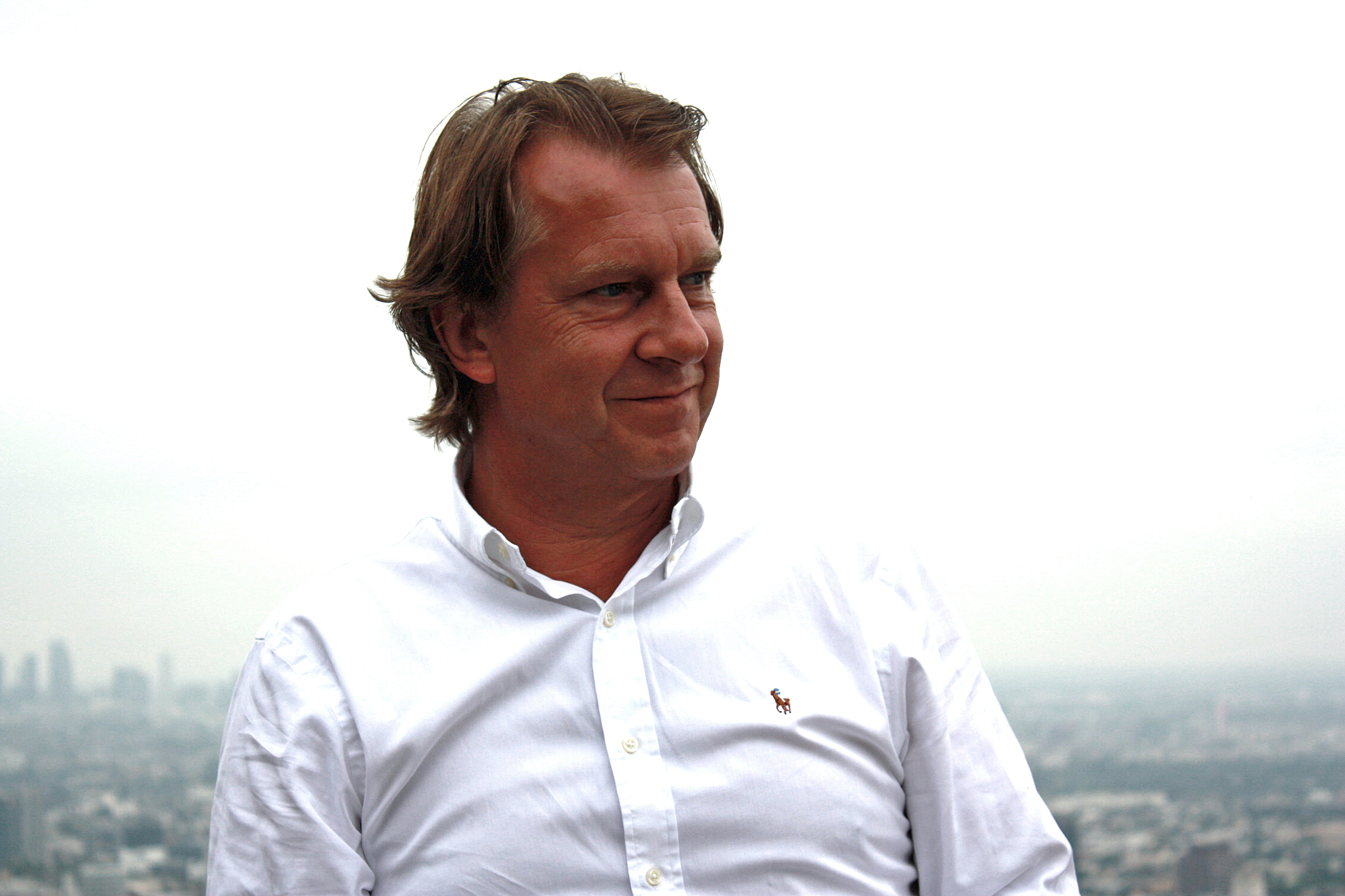 Martin Leimbach bei Dreharbeiten 2014